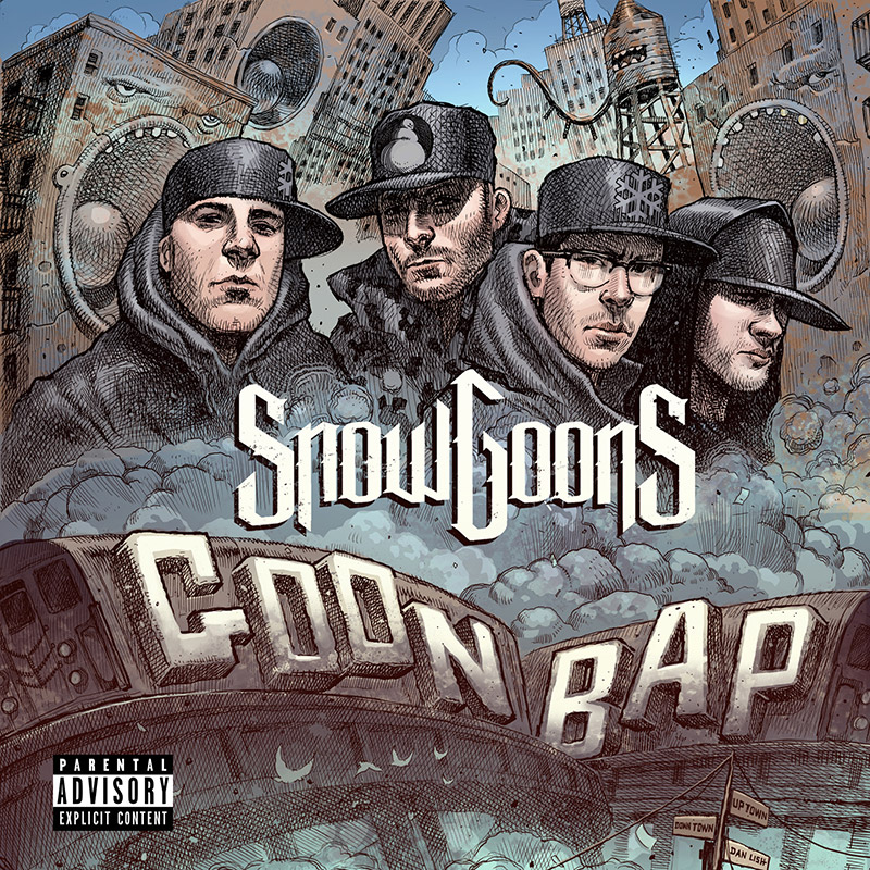 Cover des Albums "Goon Bap"